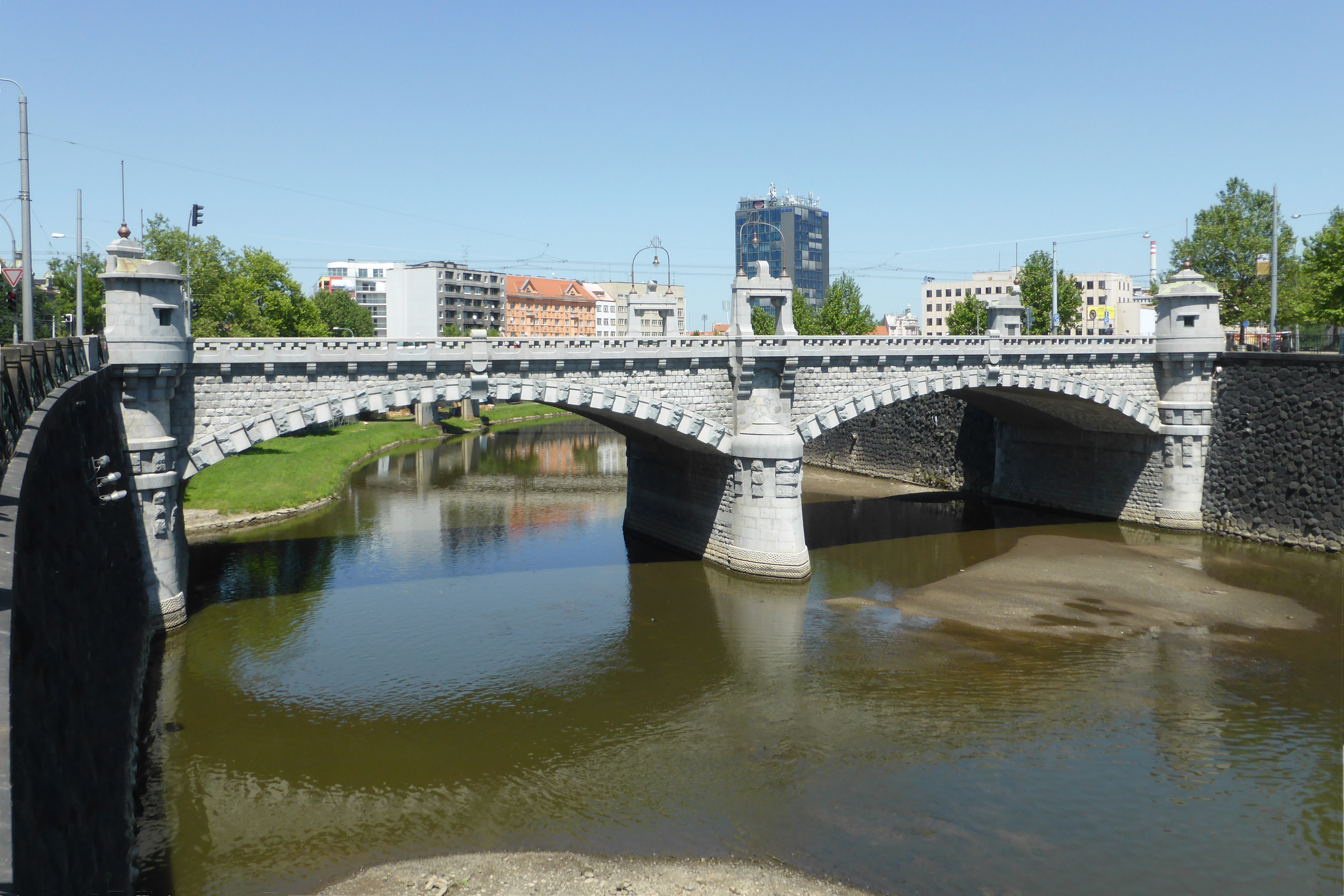 Wilsonův most v Plzni. od jihu.